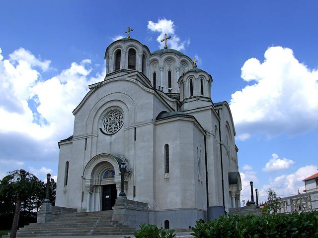 Serbian Orthodox Church in Lazarevac, Serbia/L'église orthodoxe serbe de Lazarevac, Serbie